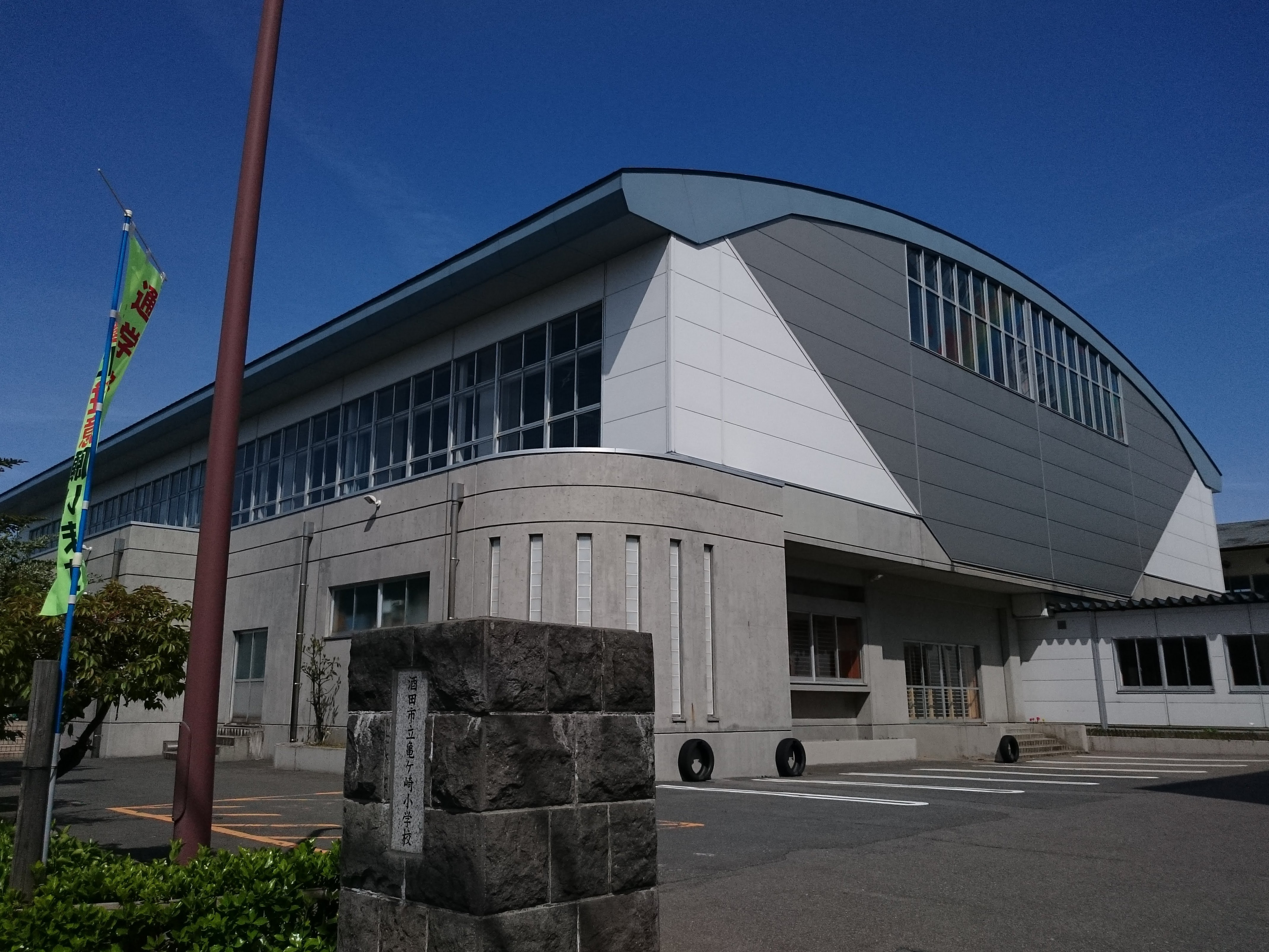 酒田市立亀城小学校・亀ヶ崎小学校の体育館